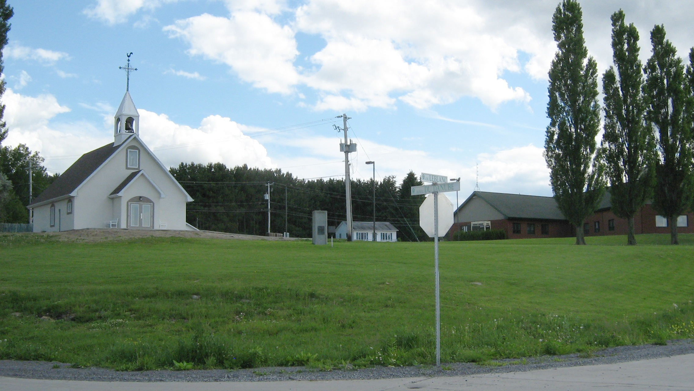 Village abénaquis de Wôlinak, située dans la province de Québec, au Canada